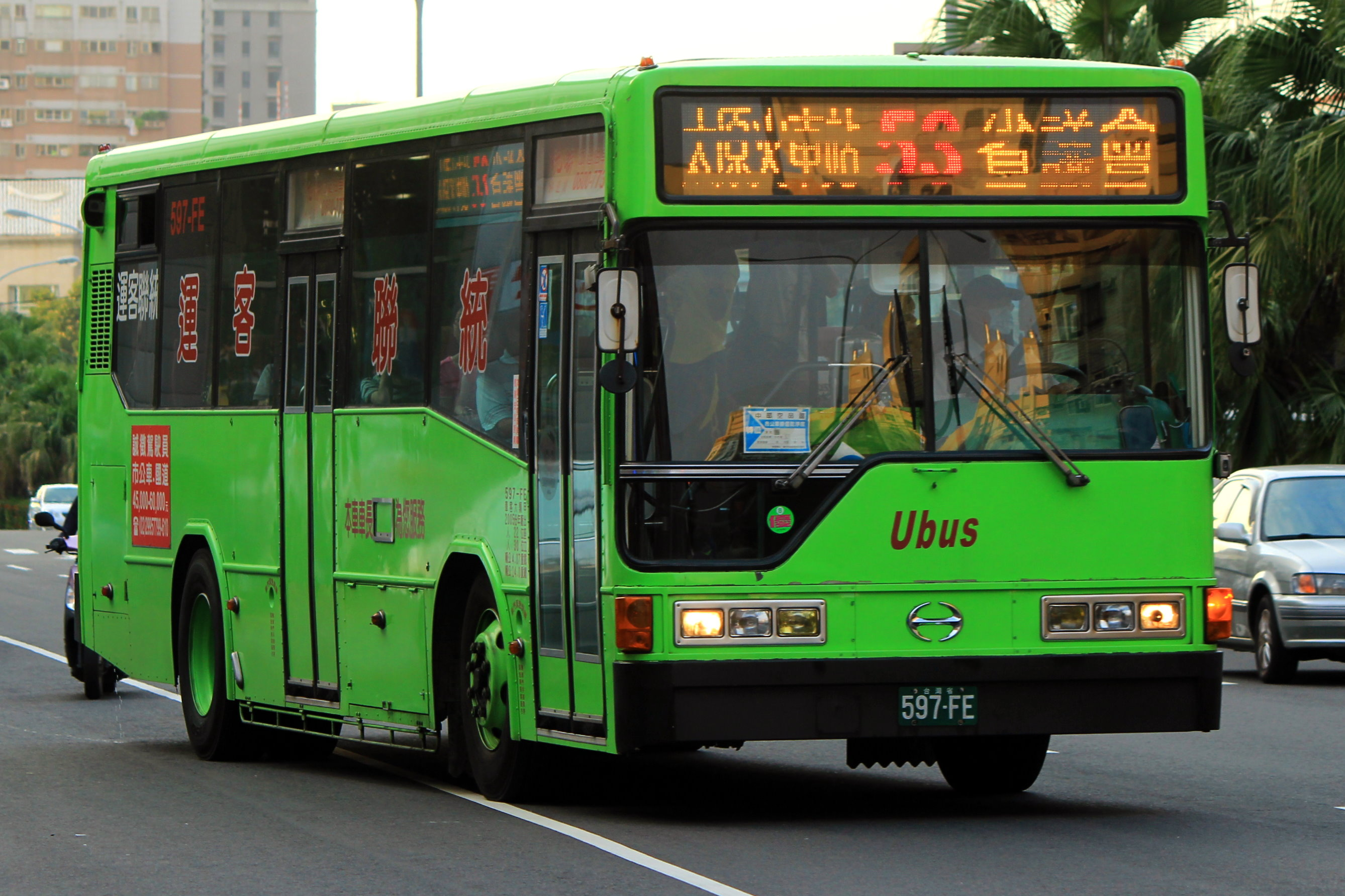 統聯客運2005年日野ERK2JML大客車597-FE。